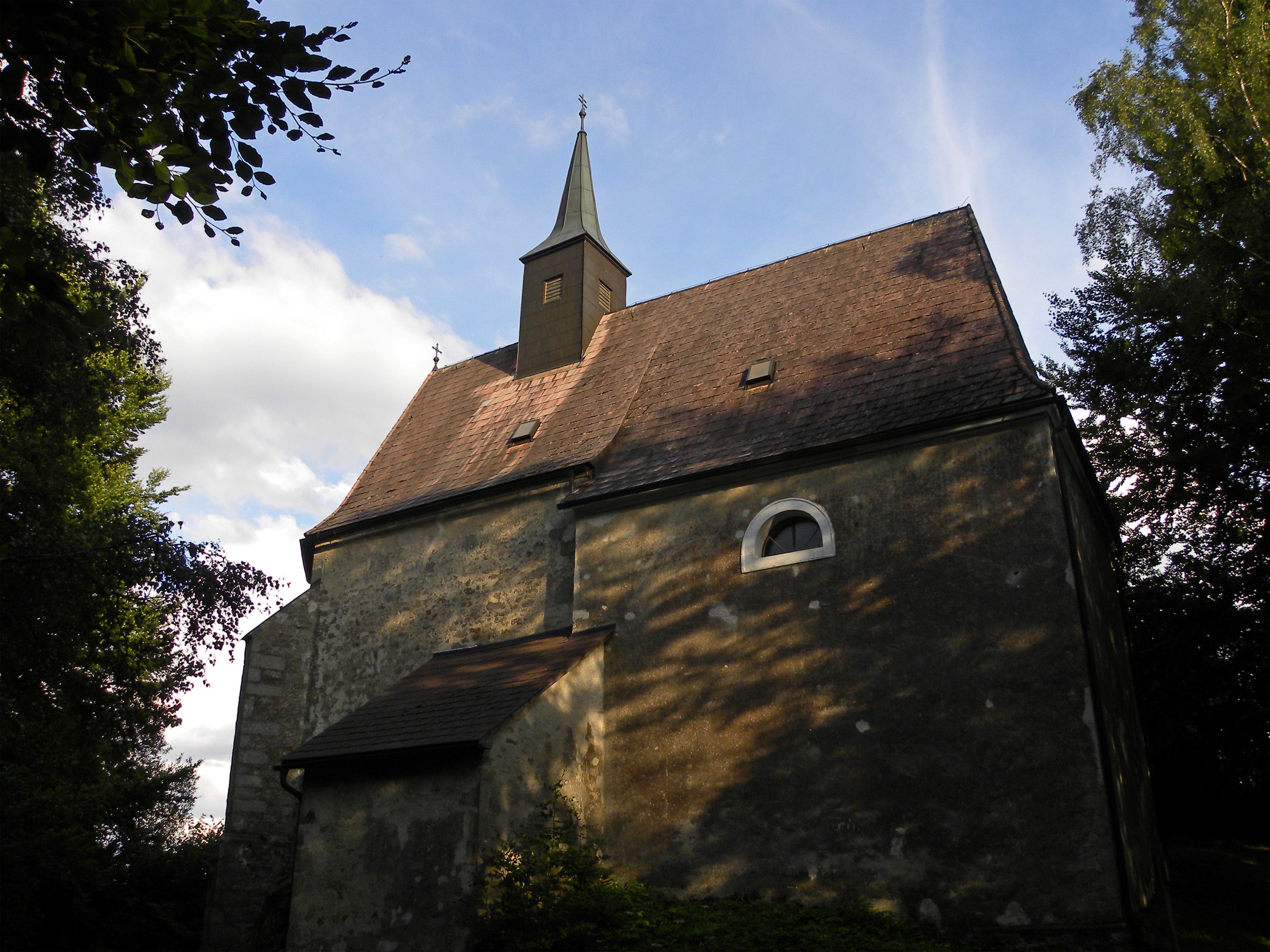 Kath. Filialkirche hl. Johannes der Täufer, ehem. Burg Hadmarsteine